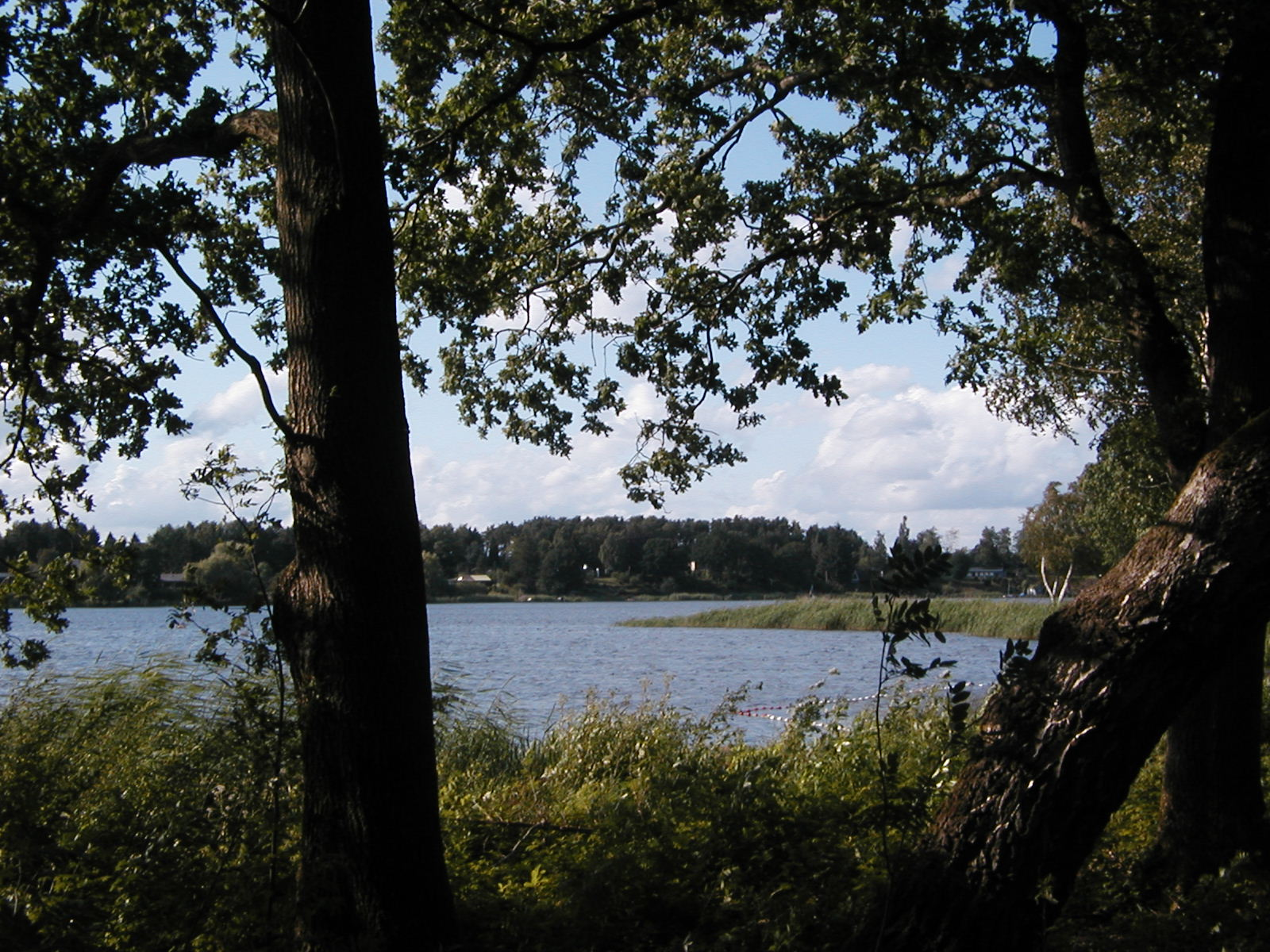 Der Brahmsee in Schleswig-Holstein, vom Ostufer gesehen